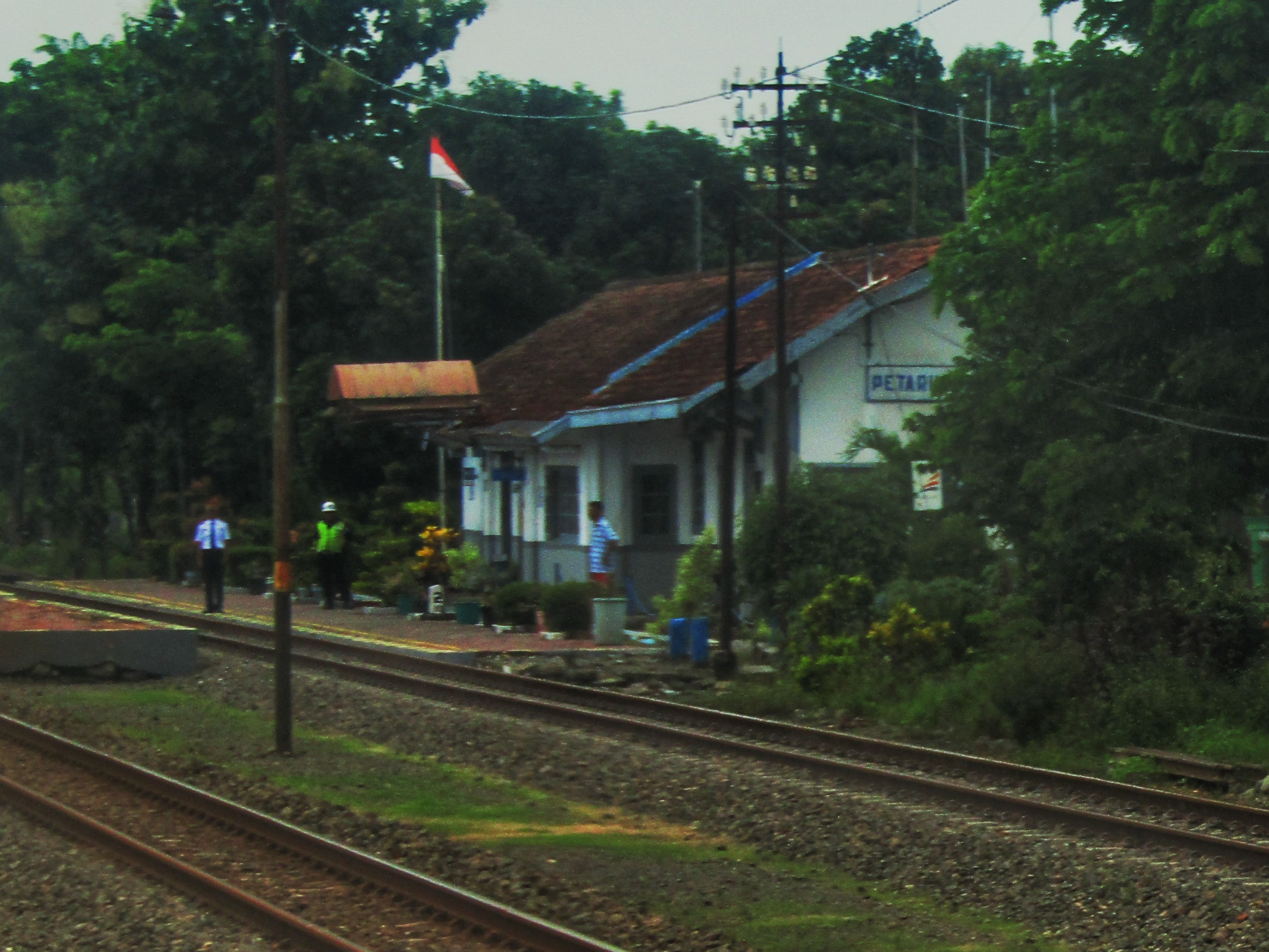 Tampak peron bangunan Stasiun Petarukan, 2019, dengan PPKA tunjuk-sebut Semboyan 1.